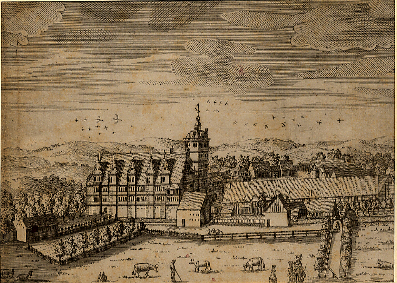 Kupferstich vom Schloss Brake in Lemgo, Kreis Lippe, Deutschland. Kupferstich von 1663/1665 Im Auftrag des Grafen Hermann Adolph zur Lippe (1616-1666) gestochene Vedute.